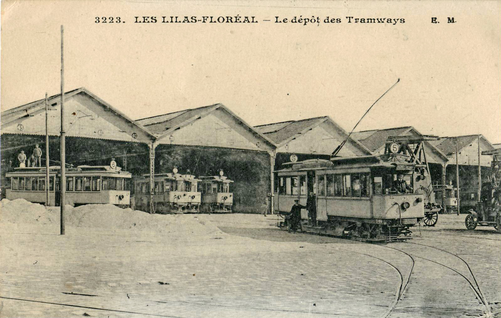 Carte postale ancienne éditée par EM n°3223 : LES LILAS FLOREAL - Le dépôt des tramways Vue du dépôt de Floréal, du temps de l'Est-Parisien. Vue en gros plan de la motrice 214, avec les plaques de la ligne 5 Les Halles – Bagnolet